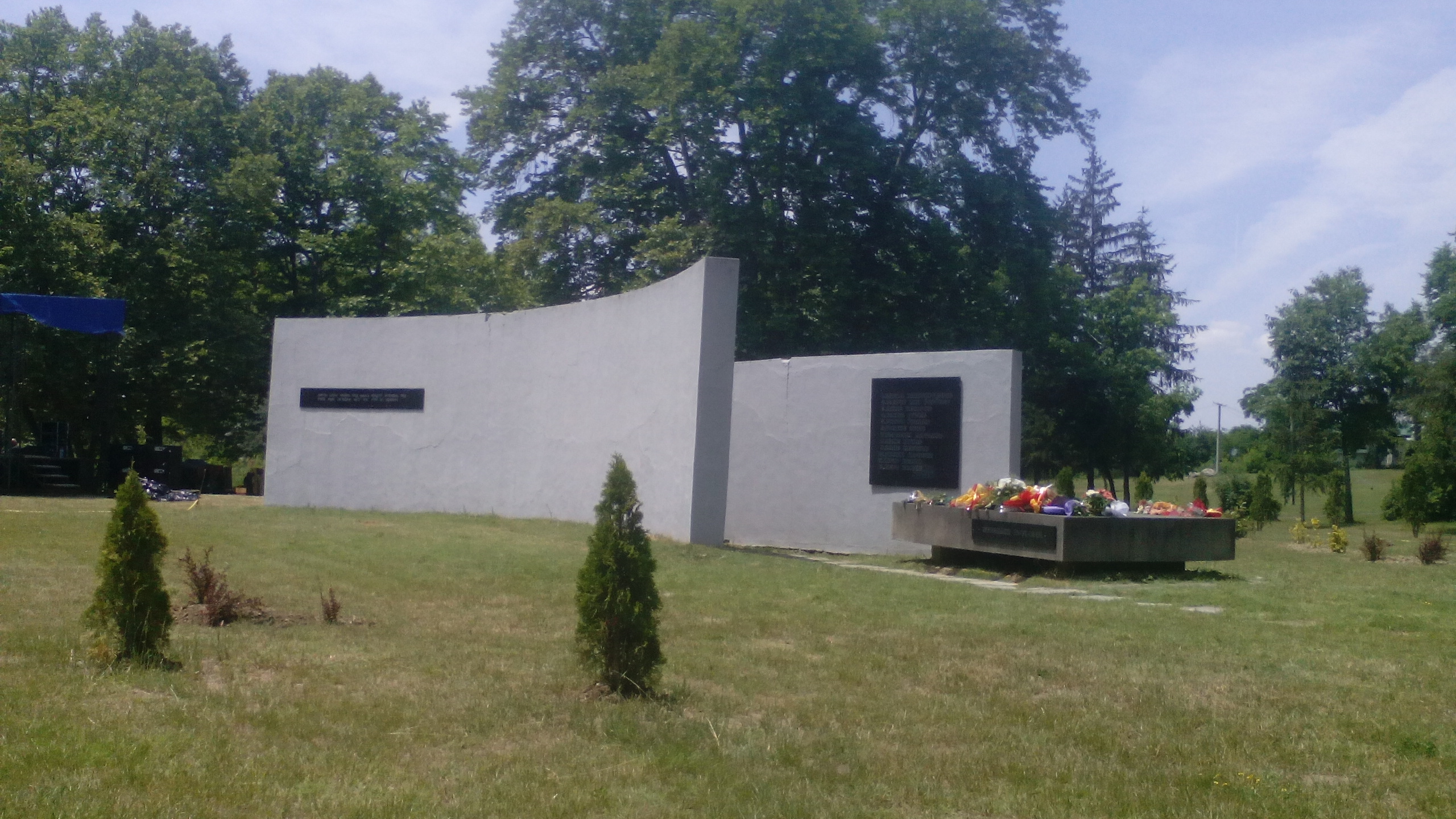 Споменик во Моклиште посветен на 12-те загинати ваташки младинци во 1943 година